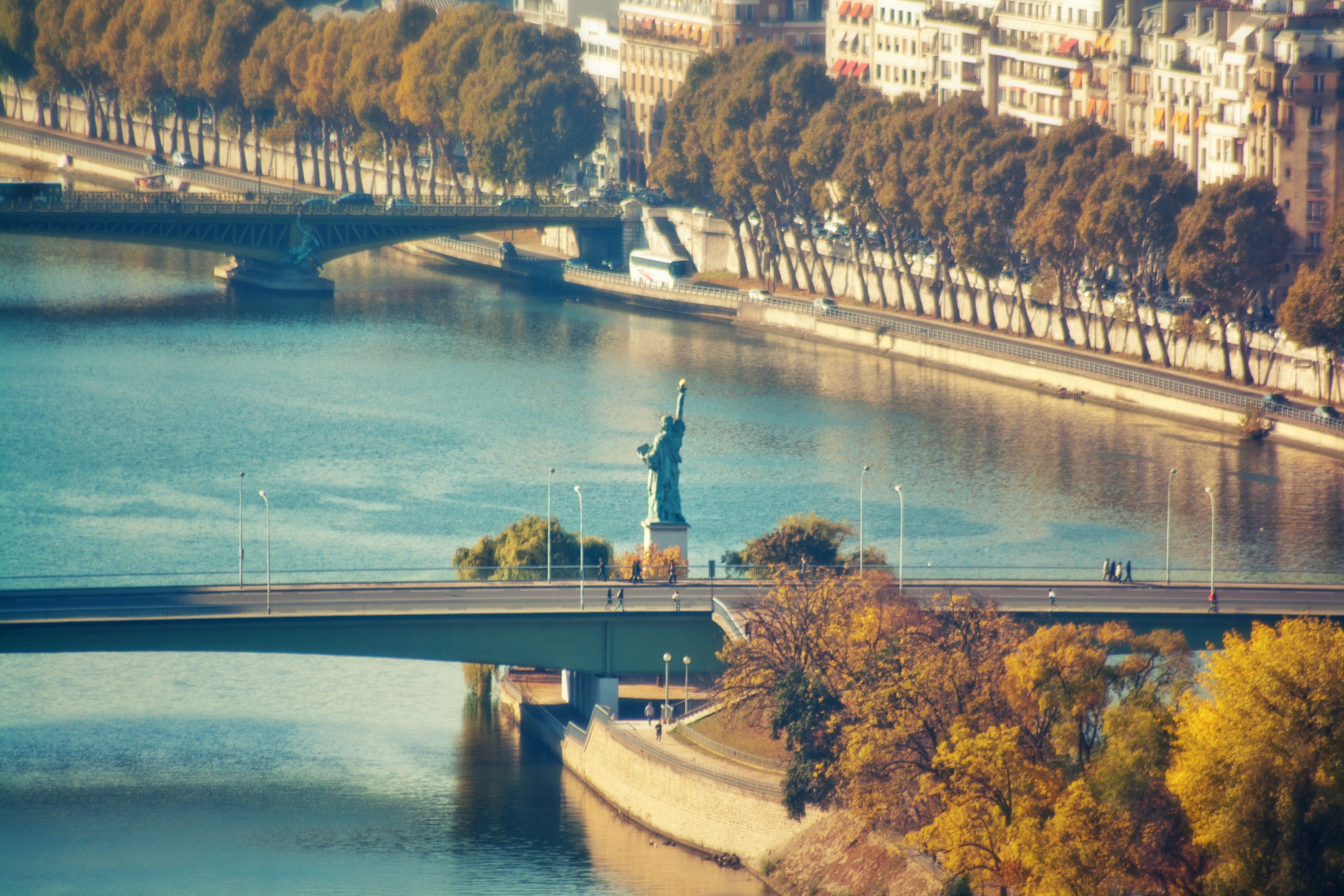 París, Francia